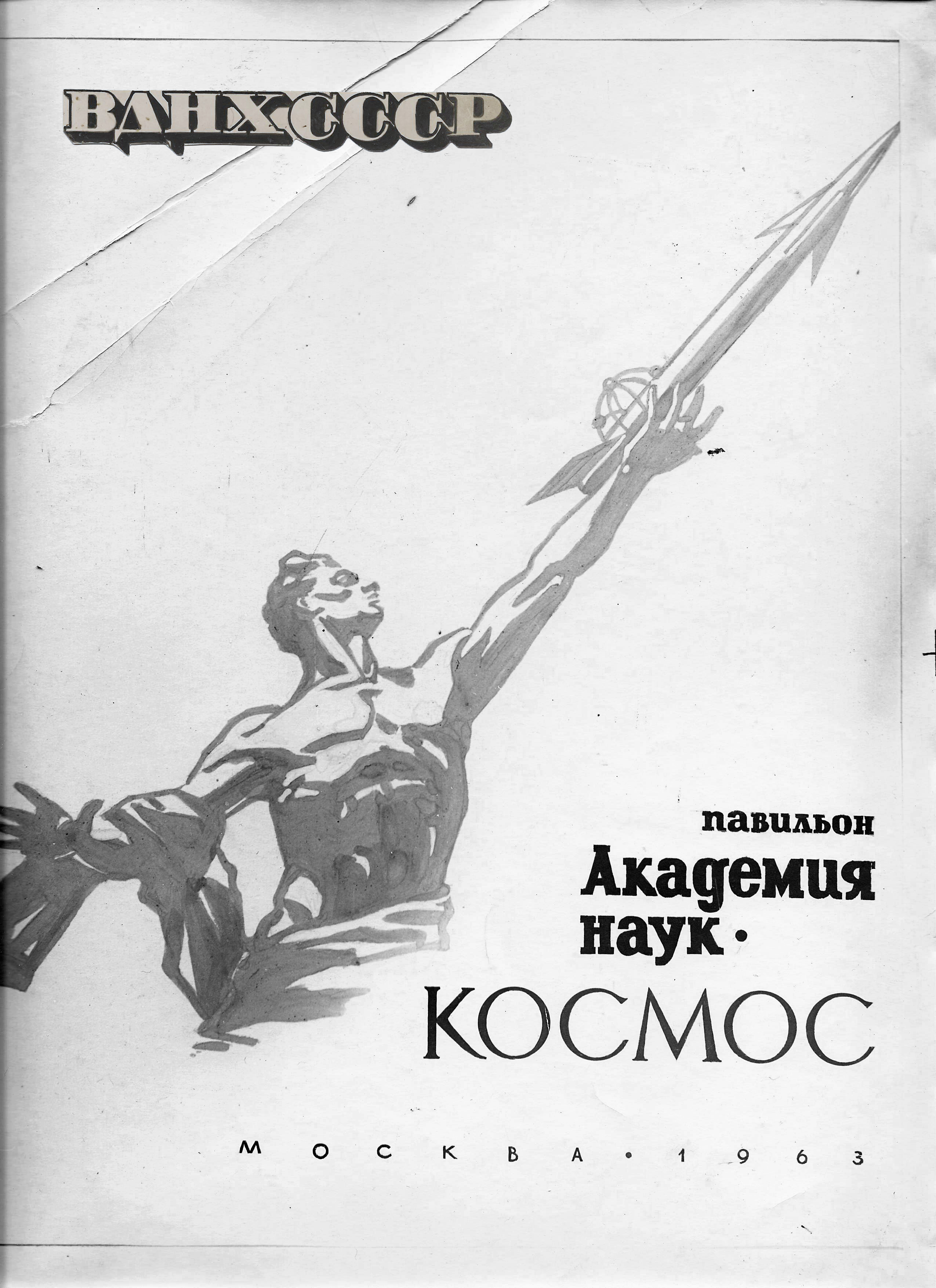 Художник Анатолий Викторович Борисов (1933–1969). «Павильон Академии Наук СССР “Космос”». Обложка рекламного буклета «ВДНХ СССР». Коллаж. 1963 год. Собрание Михаила Тренихина. (Павильон №2 «Народное образование» До 1959 года – «Северный Кавказ», в 1959–1963 годах – «Наука», в 1964–1966 годах – «Космос»)